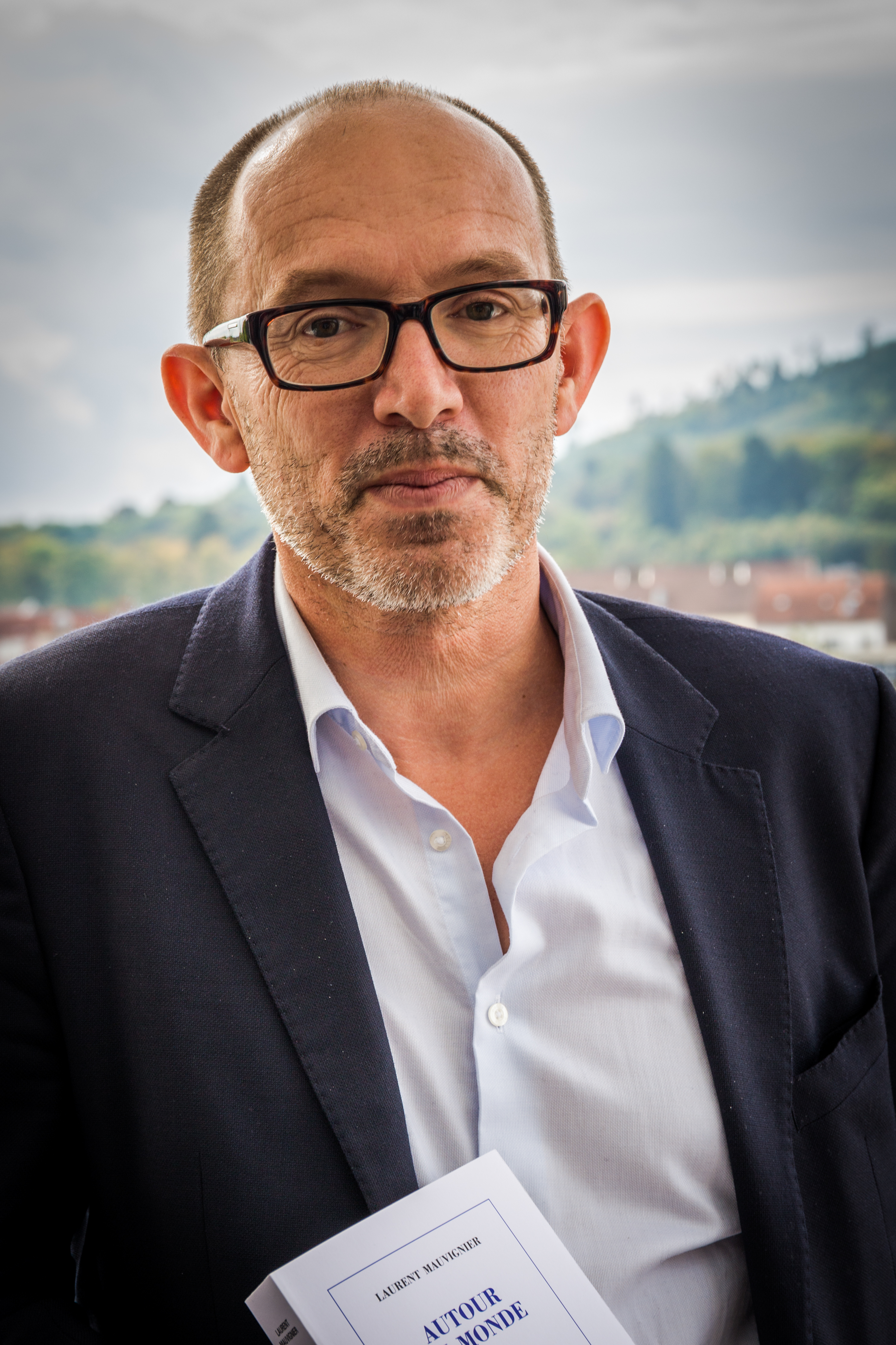 Laurent Mauvignier, lauréat du Prix Amerigo-Vespucci 2014, lors du Festival international de géographie à Saint-Dié-des-Vosges en octobre 2014.